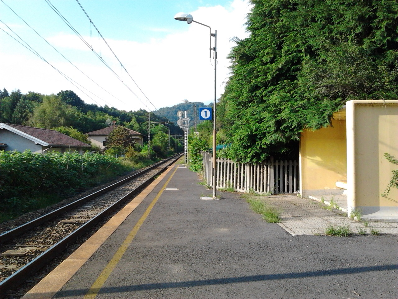 Binario lato Domodossola della stazione di Bolzano Novarese